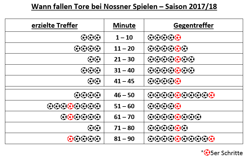 Statistik, wann Treffer in der Spielzeit 2017/18 bei den Herren der Abteilung Fussball gefallen sind.